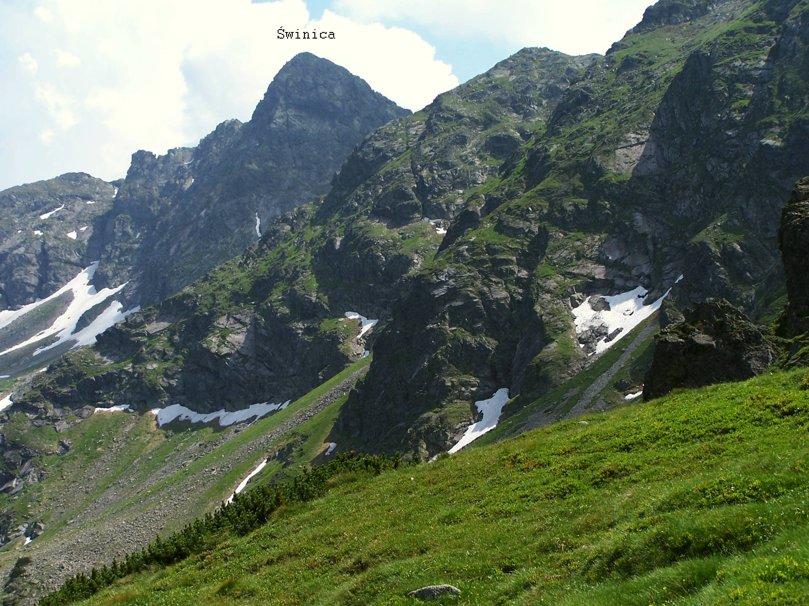 Świnica, Pośrednia Turnia, Skrajna Turnia (Tatra Mountains)